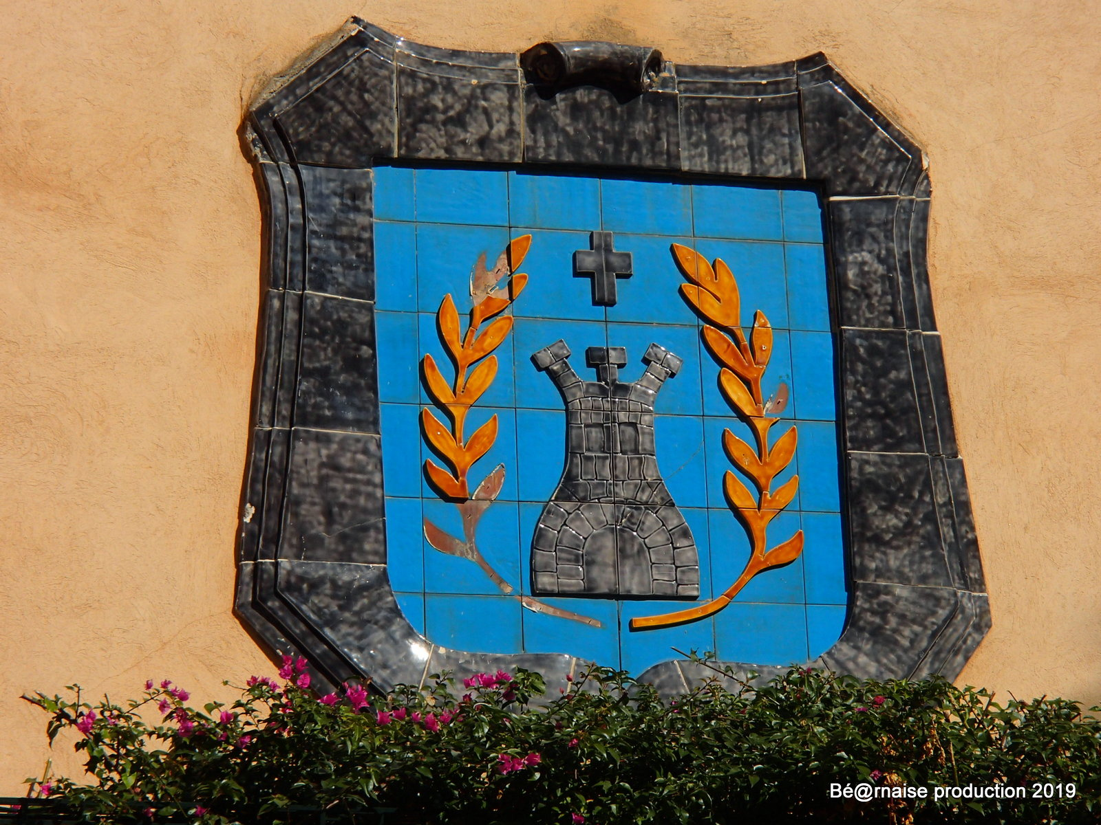 Proche de la tour romane, cette céramique sur la façade d'un immeuble, représente le blason de Sanary-sur-Mer